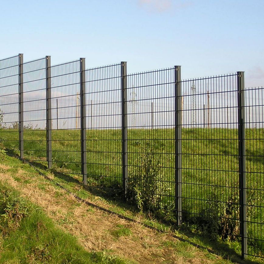 Doppelstabmattenzaun im Gefälle montiert.